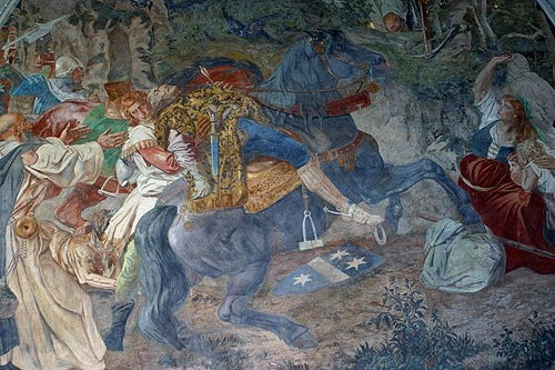 Fresko "Gesslers Tod" in der Tellskapelle (Nr. 03.1-8817) Ernst Stückelberg (1831–1903) Alternative namesJohann Melchior Ernst StickelbergerDescription Swiss painter Date of birth/death21 February 183114 September 1903Location of birth/deathBaselidemWork locationBern, Antwerp, Munich, Rome, Zurich, Basel, Sisikon UR (Urnersee)Authority control VIAF: 74648745 LCCN: nr95005764 GND: 118756206 ULAN: 500009186 ISNI: 0000 0001 1071 1613 WorldCat